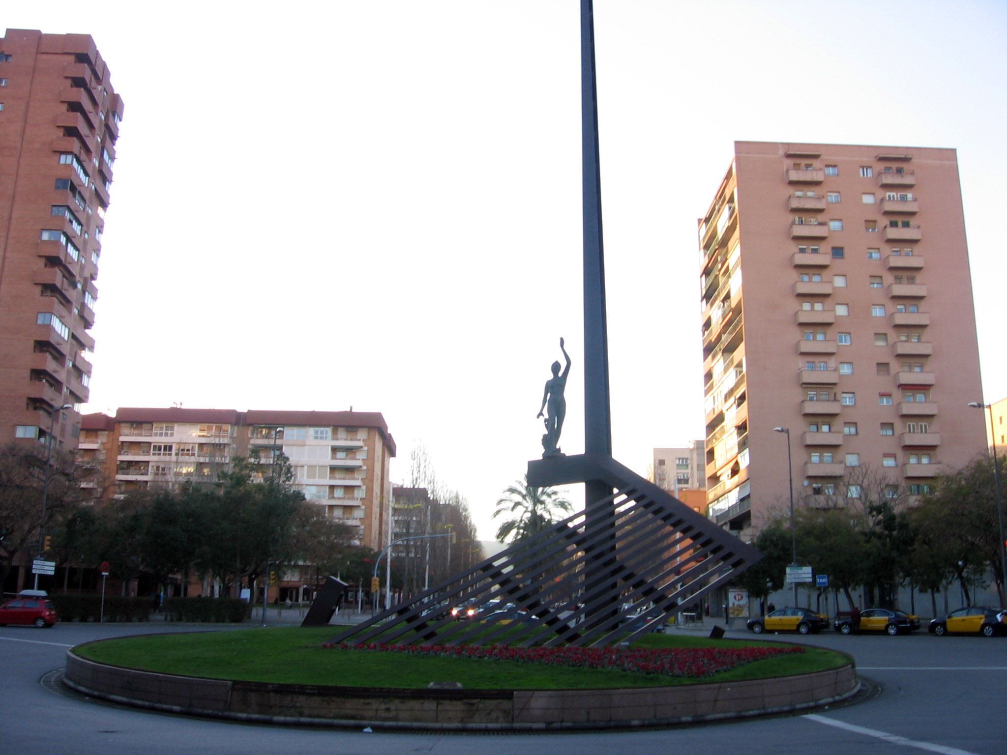 La República (Homenaje a Pi i Margall).